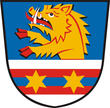 znak obce Racková